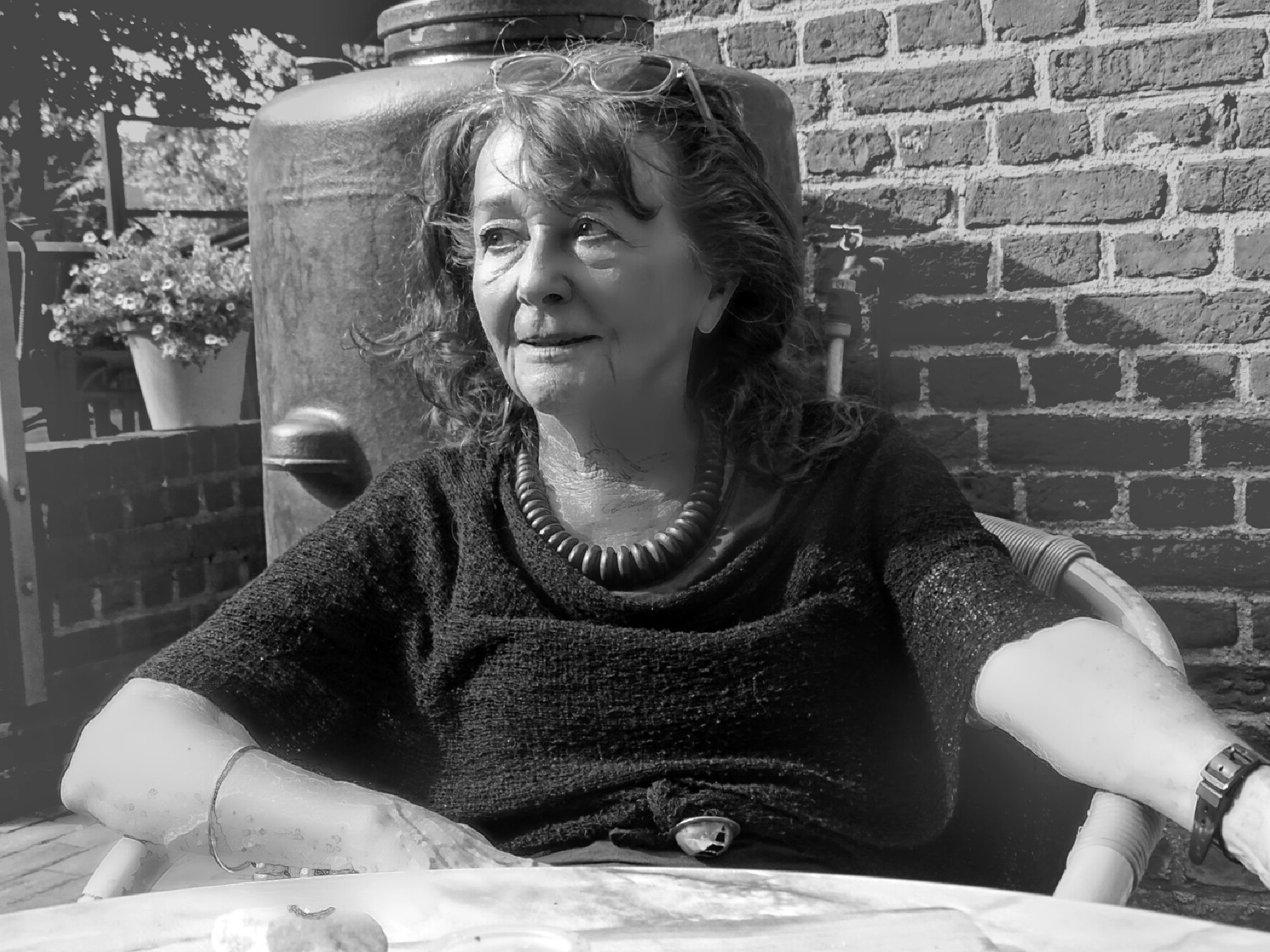 Porträtaufnahme